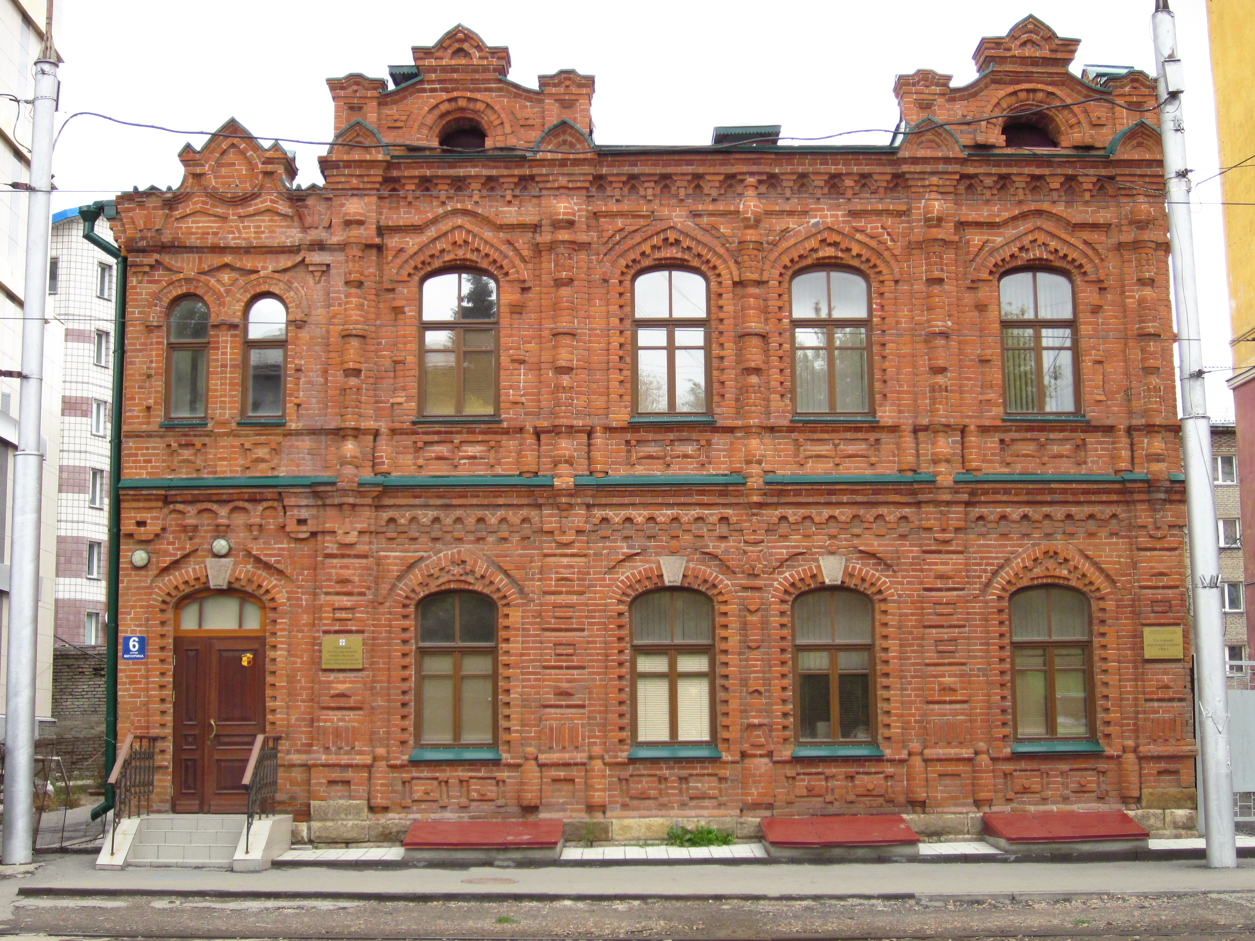 2-х этажный кирпичный особняк 1900 г. постройки, Новосибирск Цент.р-он, ул. Мичурина, 6 1900 г.